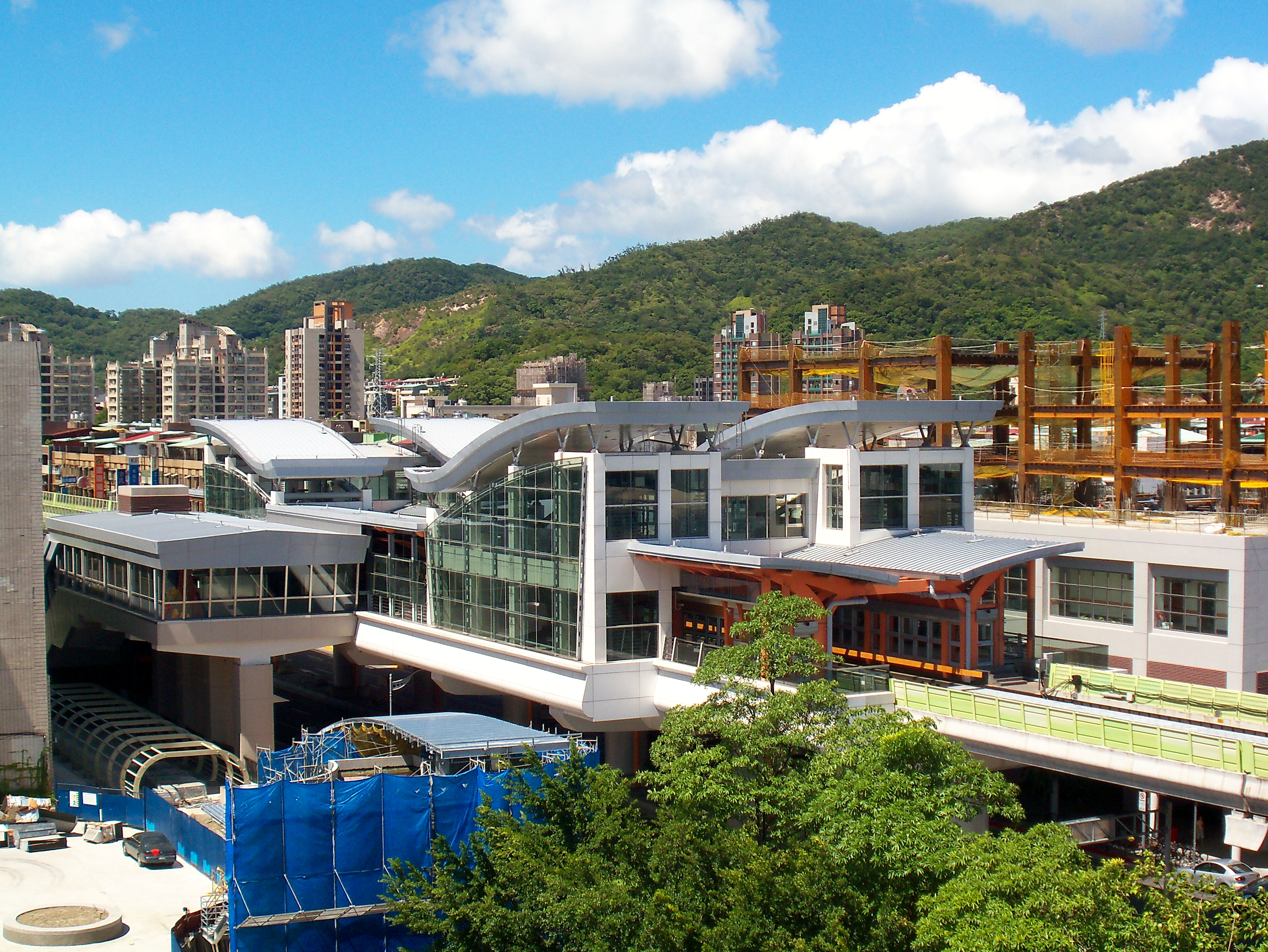 台北捷運内湖線港墘駅駅舎。